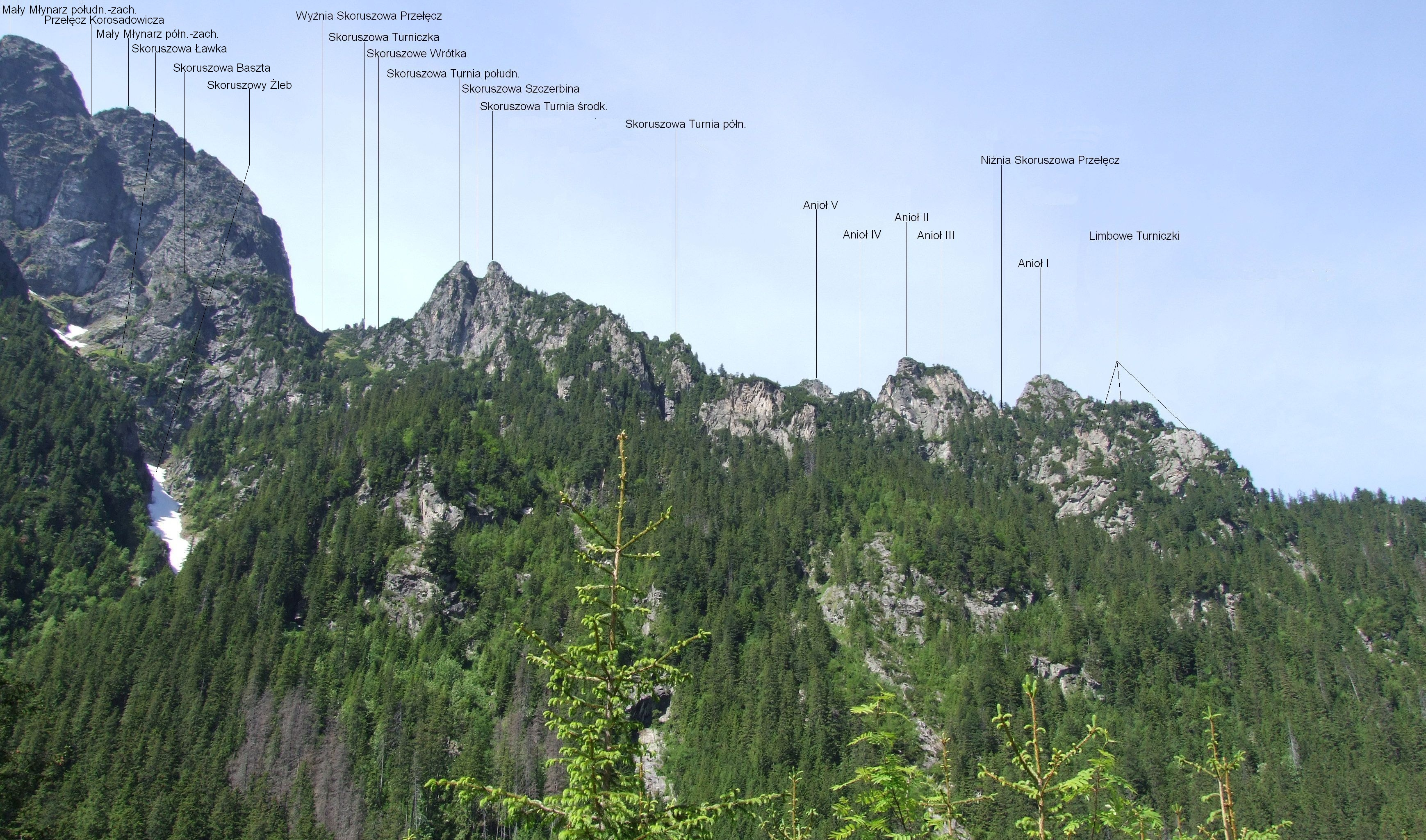 Skorušniak